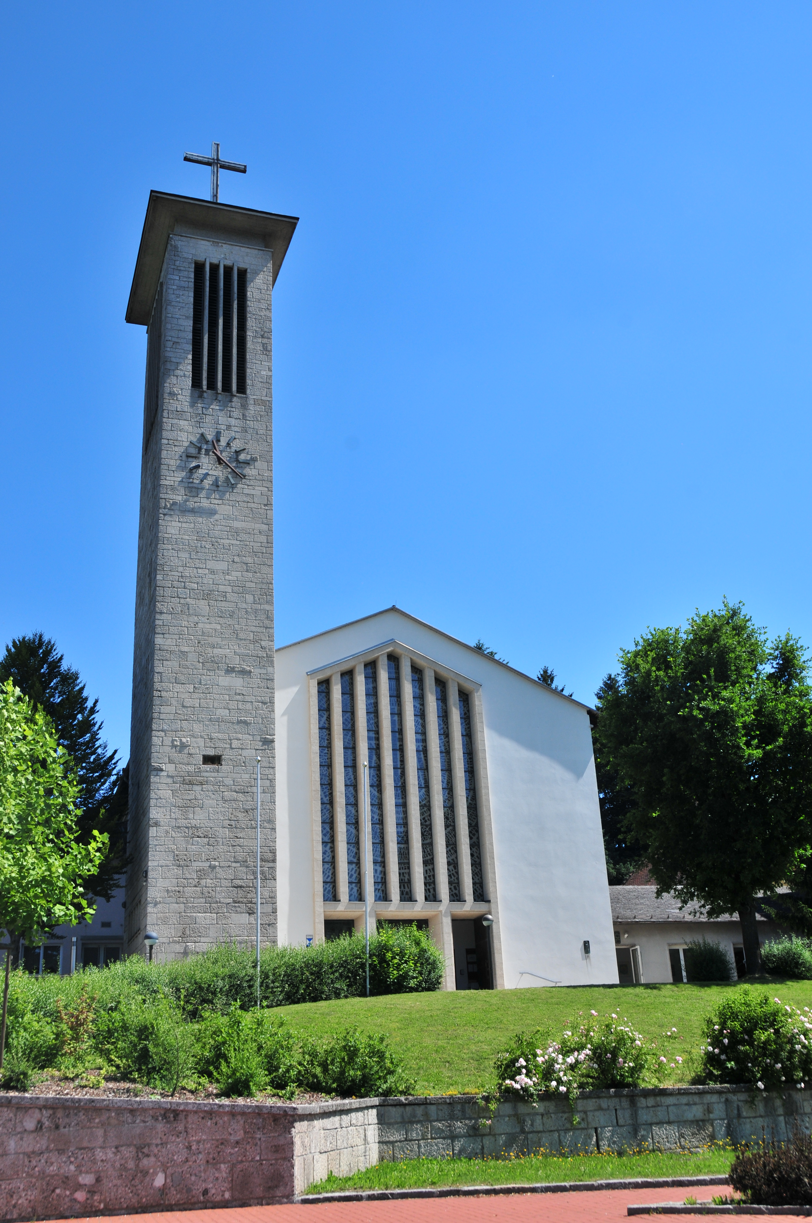 Kath. Pfarrkirche, Lourdes-Gedächtniskirche